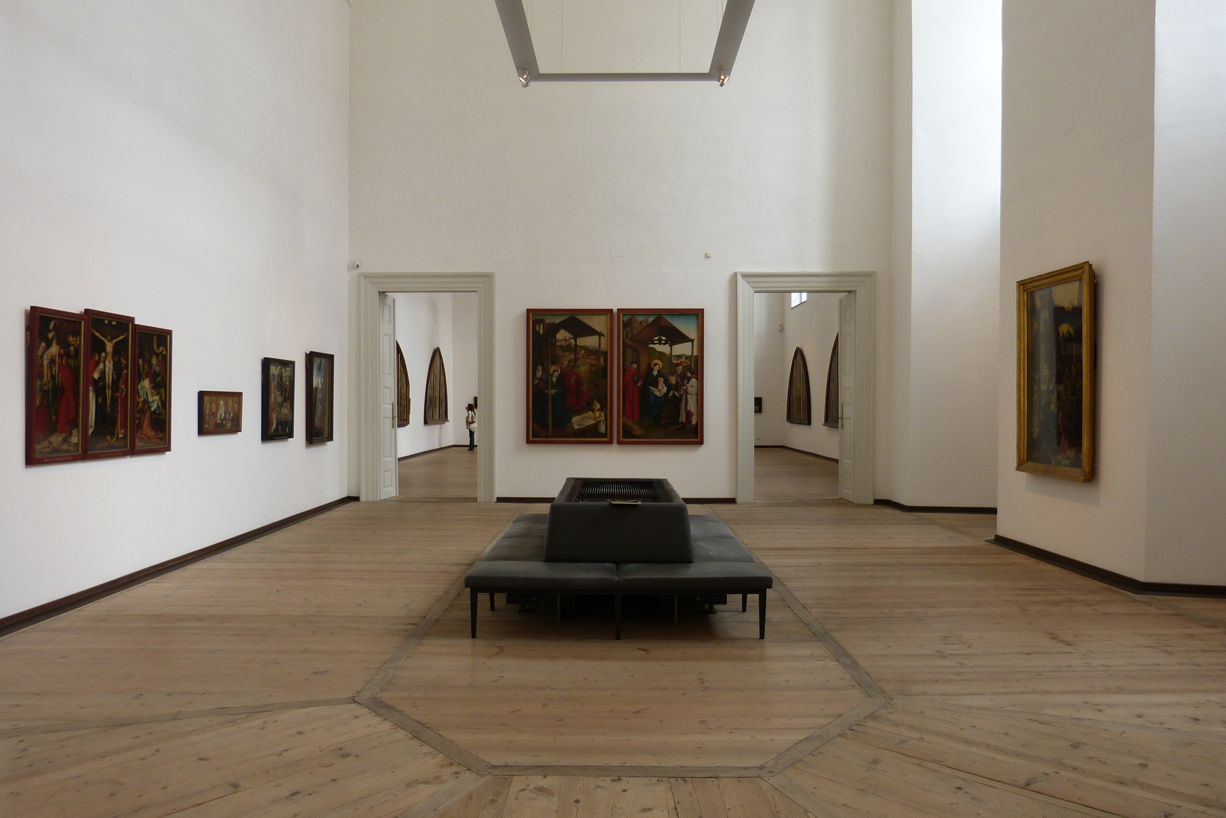 Staatsgalerie Altdeutsche Meister (Augsburg). Blick vom Zugang im Osten in den Chorraum der ehemaligen Katharinenkirche.